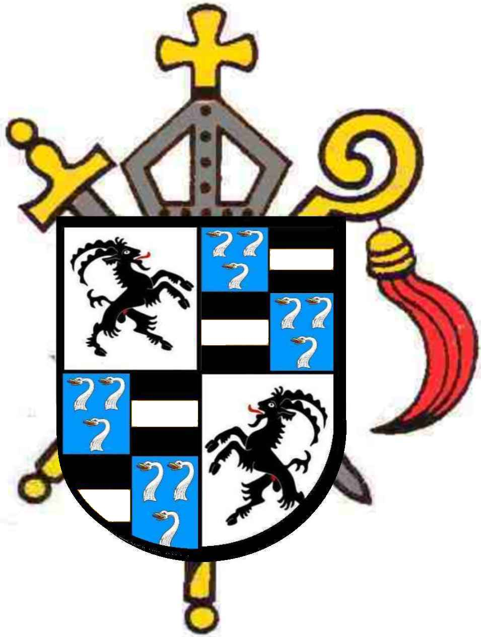 Wappen Johannes V. Flugi von Aspermont, Fürstbischof von Chur 1601–1627